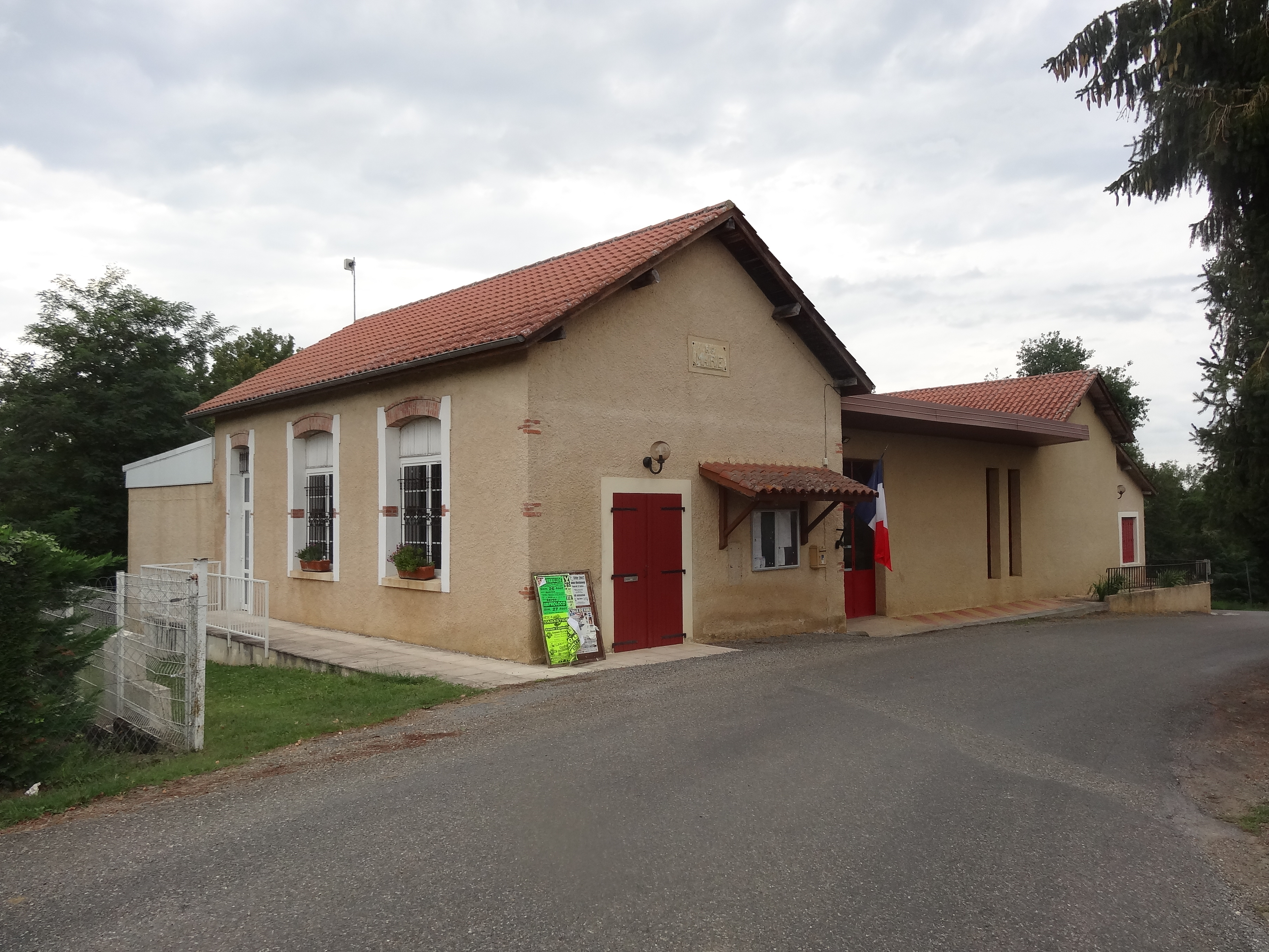 Mairie de Cuélas.